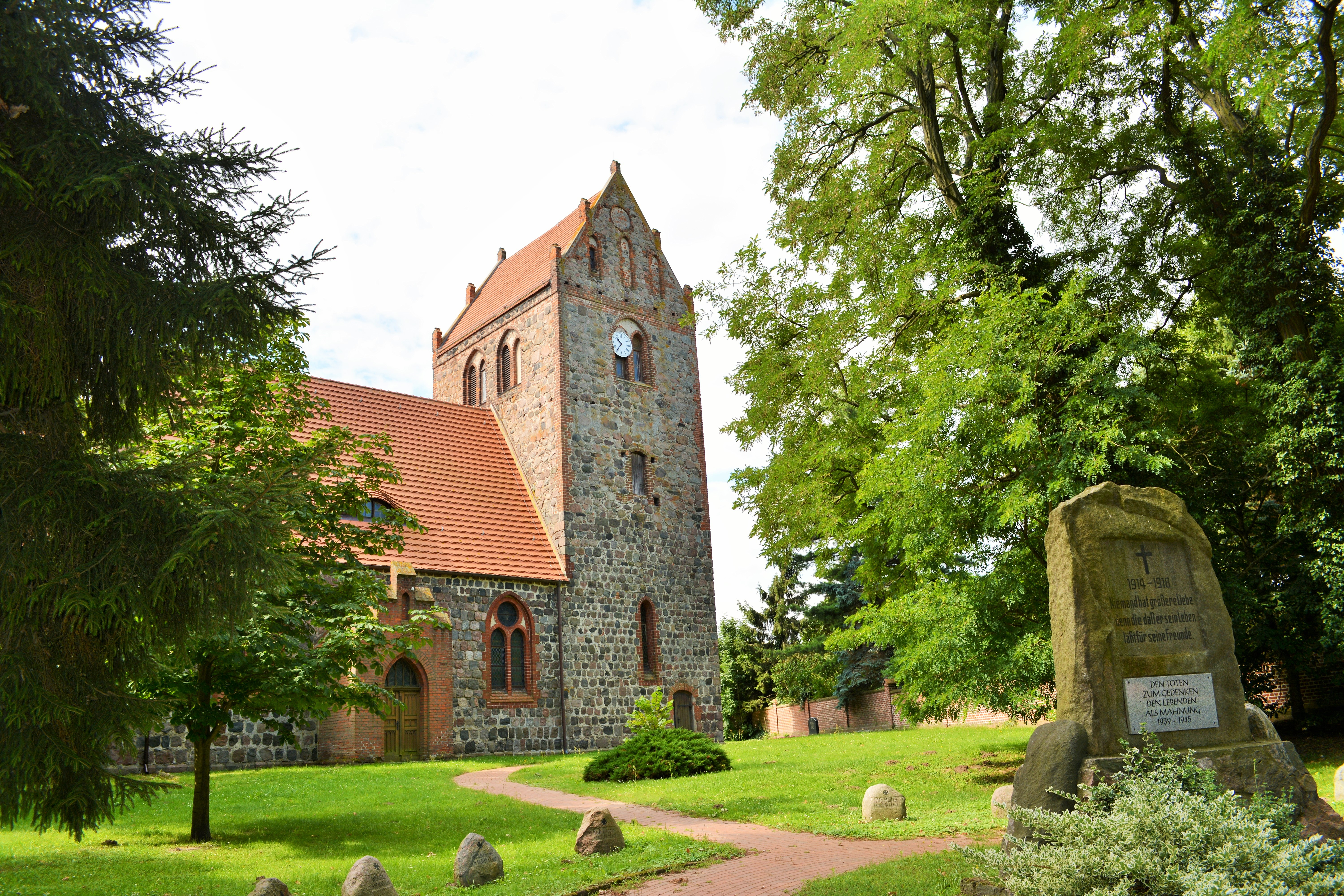 Denkmalgeschützte Dorfkirche in Gottberg, Ortsteil von Märkisch Linden, Landkreis Ostprignitz-Ruppin